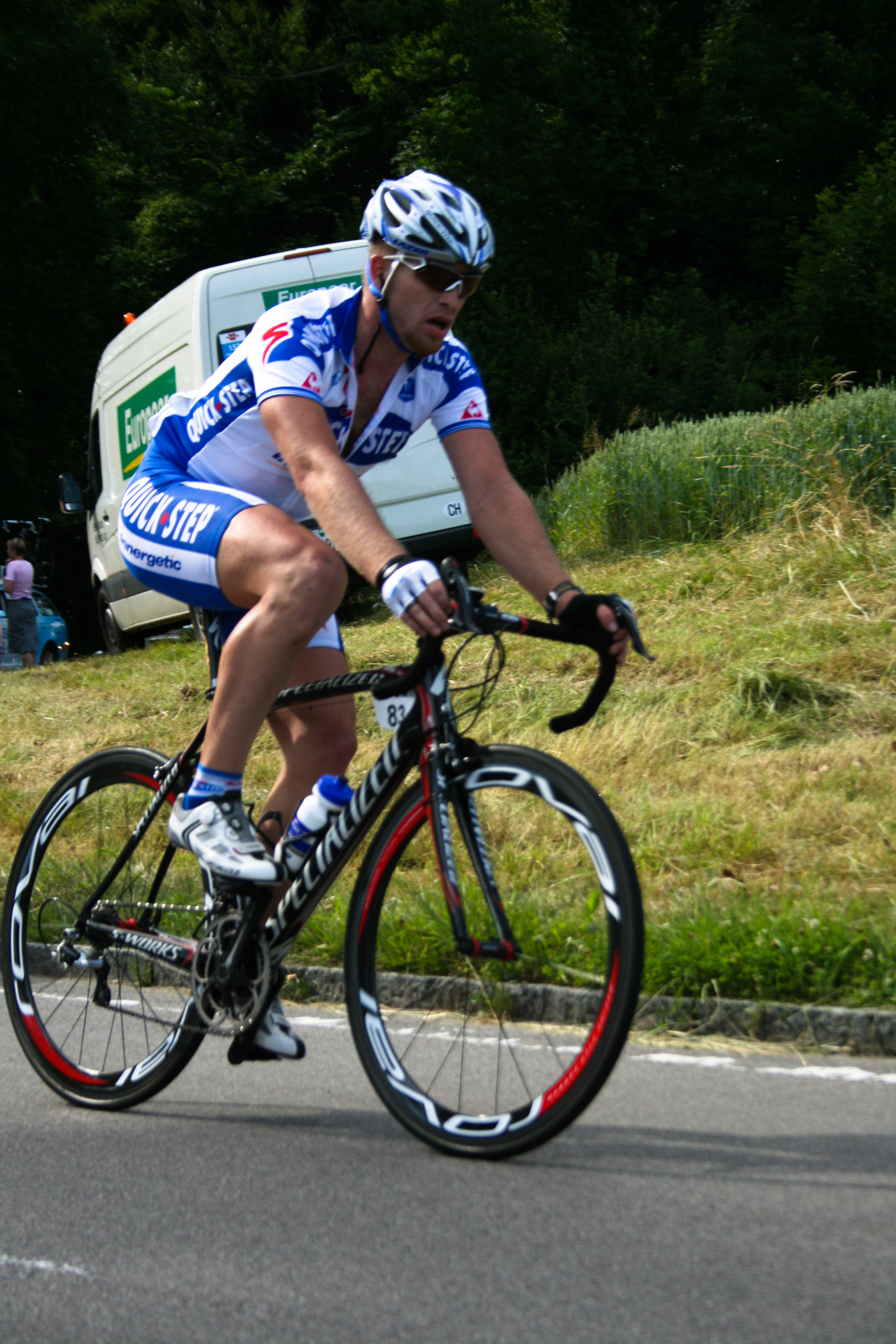 Sébastien Rosseler lors de la 7ème étape du tour de Suisse 2008